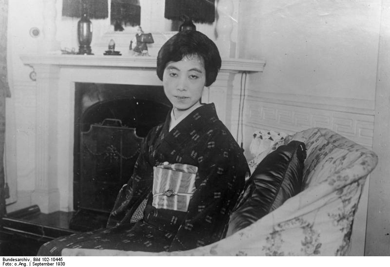 Die Führerin der japanischen Gesellschaft, Baronin Ischi Moto kommt zu Studienzwecken nach Deutschland ! Die bekannte japanische Baronin Ischi Moto in ihrem Heim in Tokio.